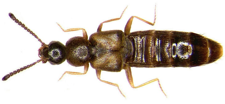 Familie: Staphylinidae Grösse: 2,8-3 mm Verbreitung: Europa Ökologie: an Pilzen Fundort: Germania, Bayern, Oberfranken, Kulmbach leg. det. U.Schmidt, 1983 Foto: U.Schmidt, 2006